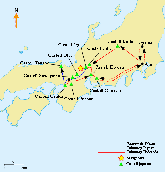 Moviments de l'exercit de Ieyasu en la batalla de Sekigahara